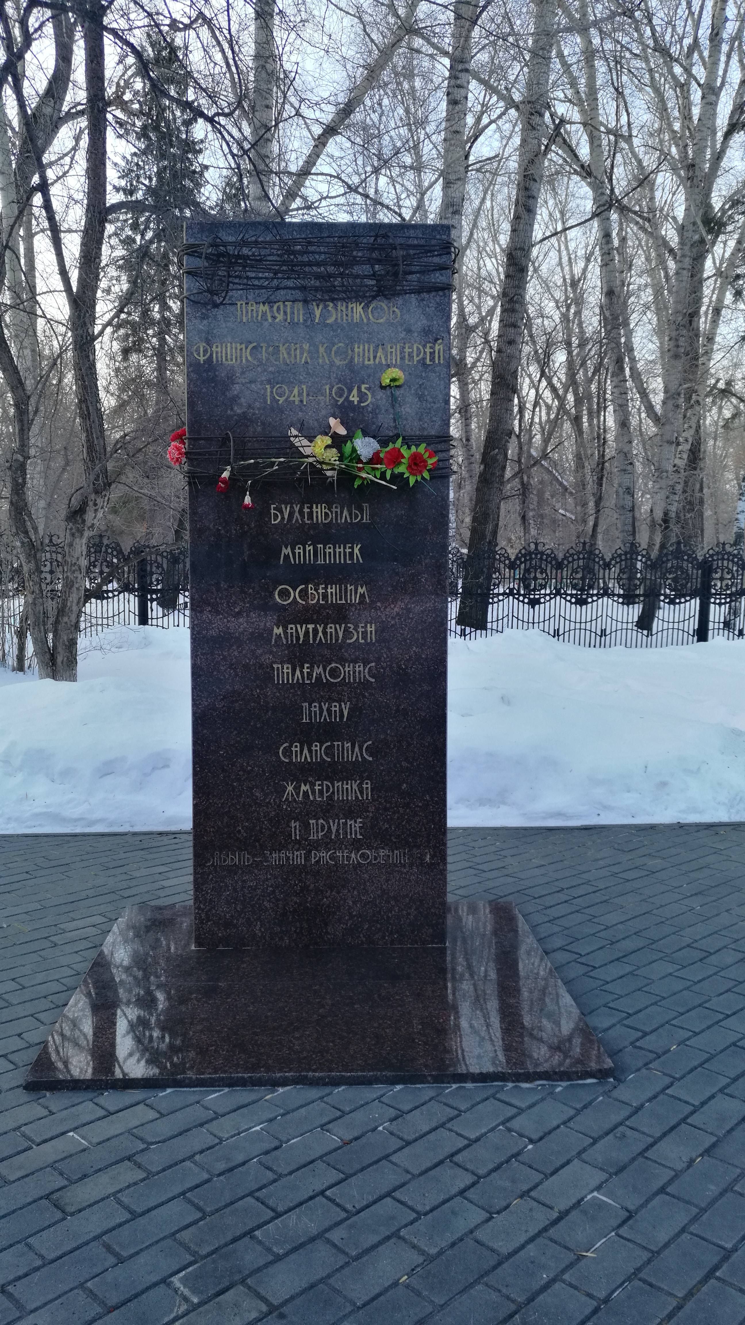 Monumento al viktimoj de la naziaj koncentrejoj. Tjumeno, Rusio.